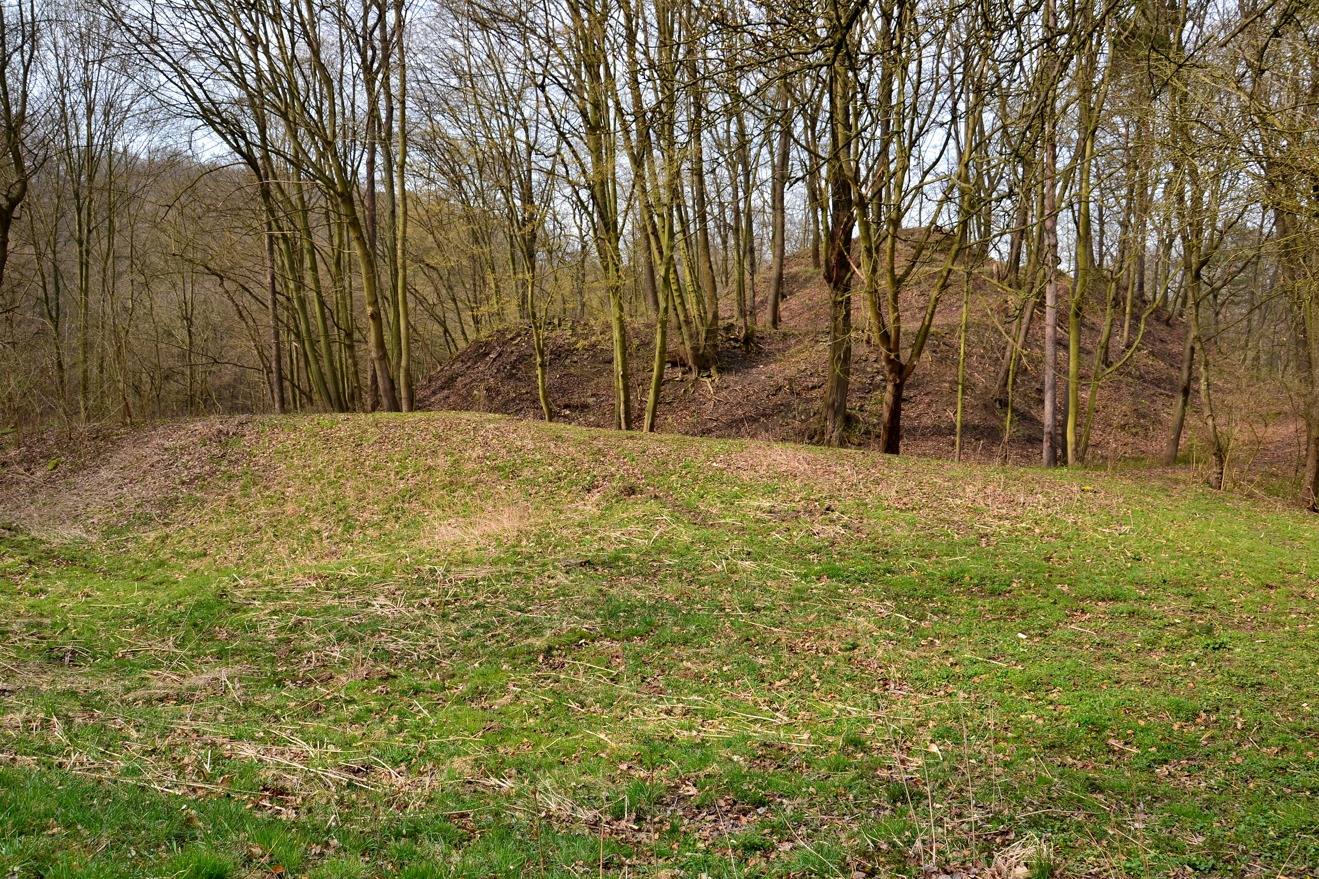 Celkový pohled